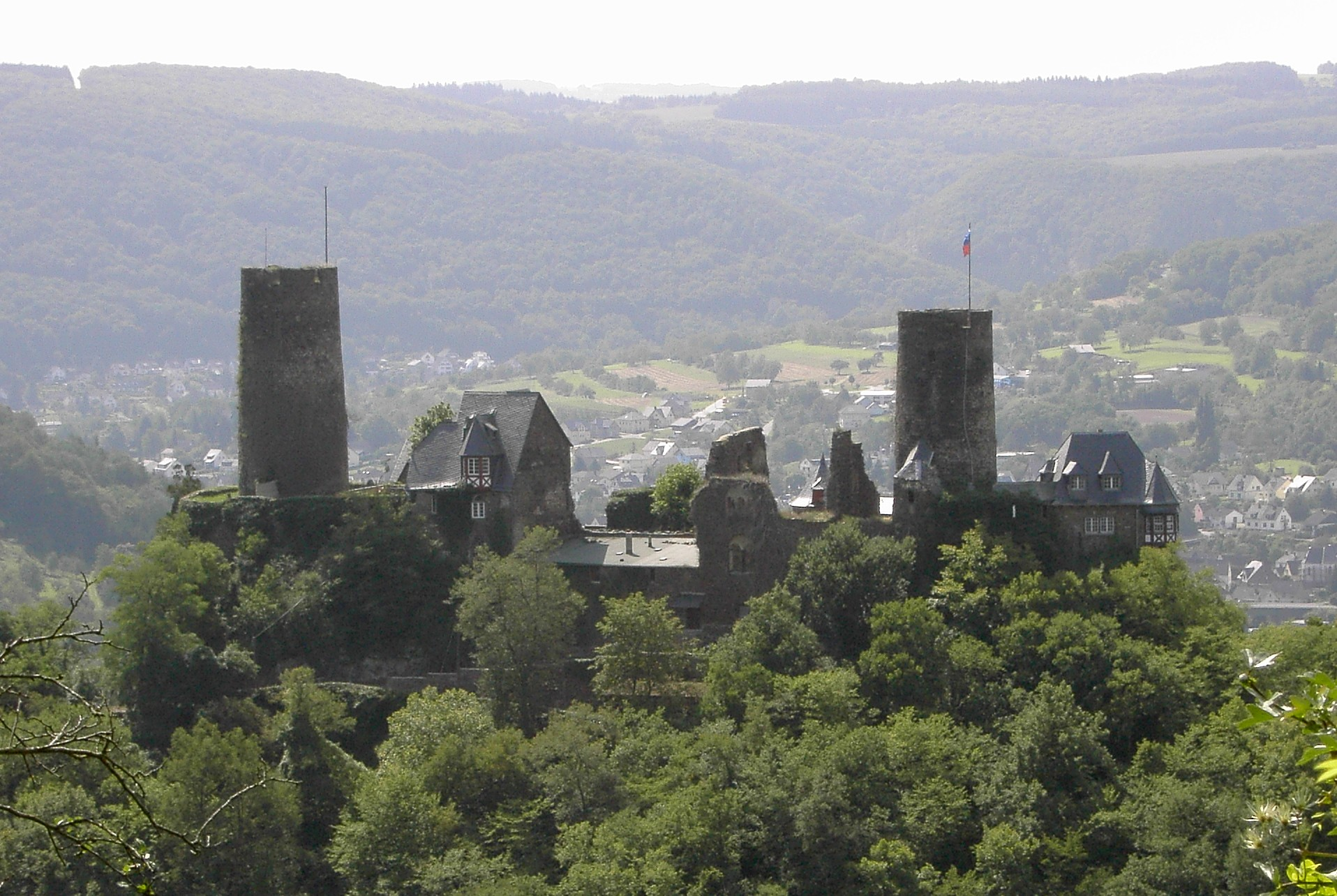 Burg Thurant vom Oberfeller Bleidenberg aus gesehen - Ausschnitt aus einem etwas größeren Foto